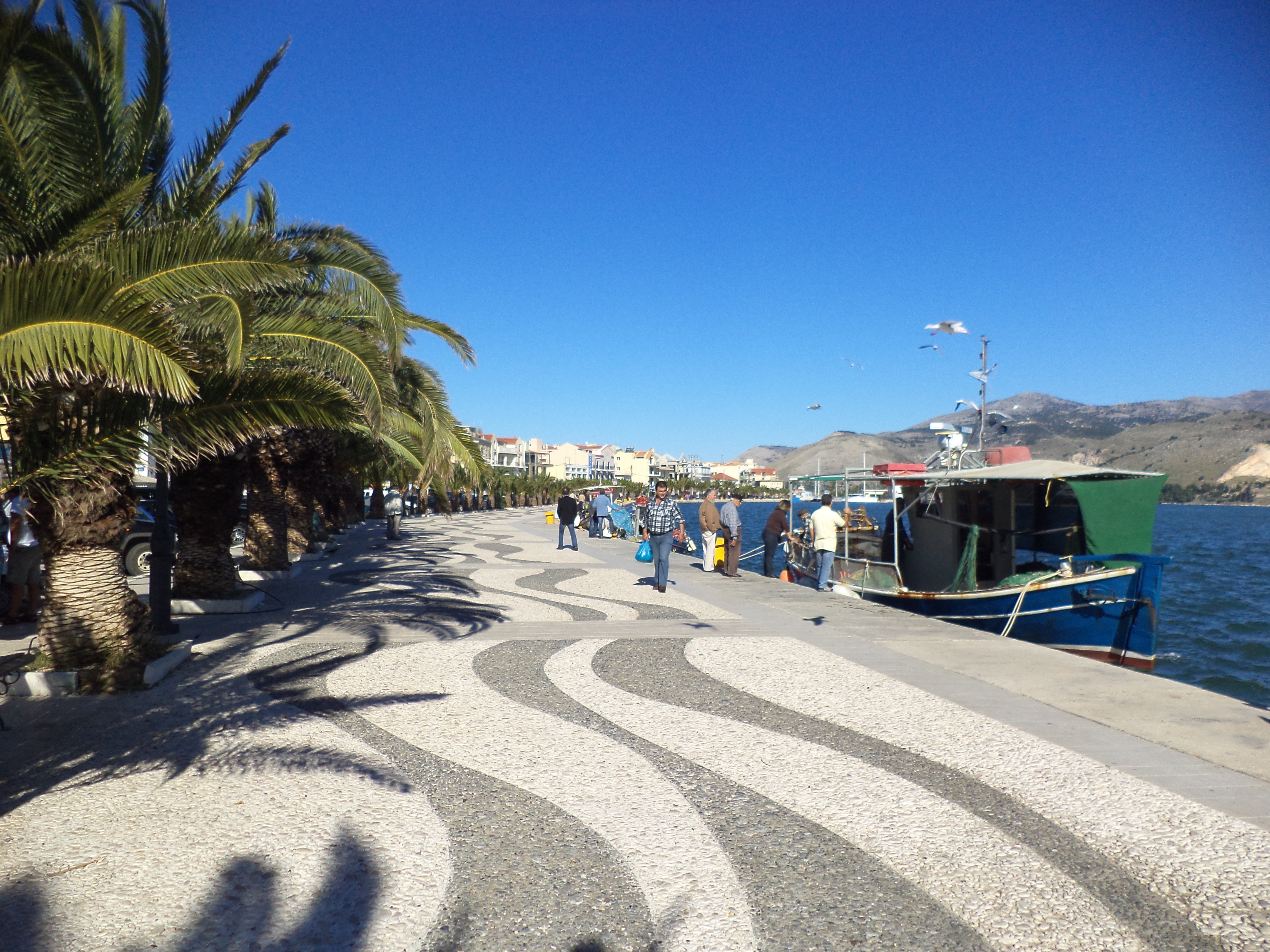 Άποψη της παραλίας Αργοστολίου.